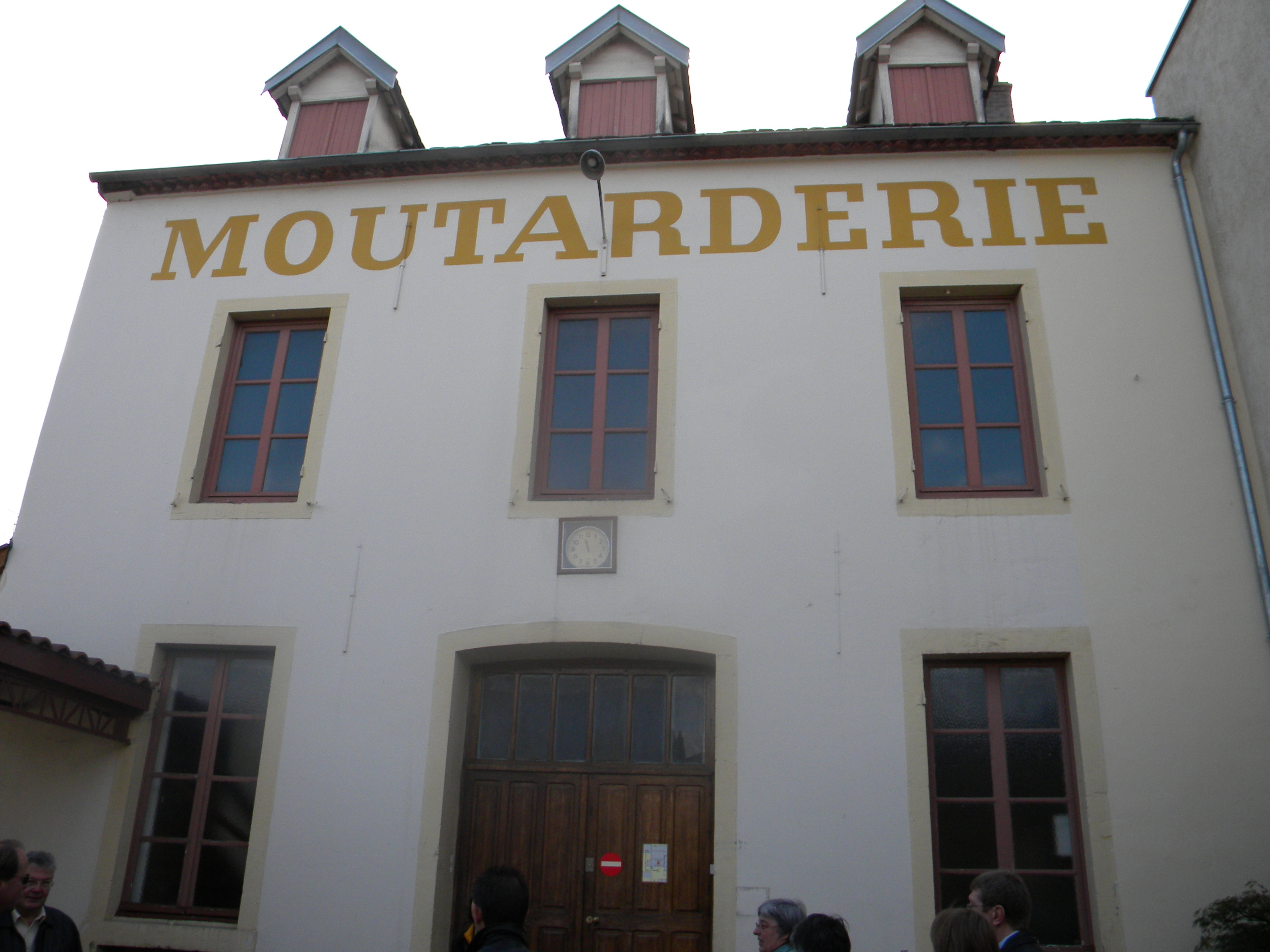 Mustardejo en Bono